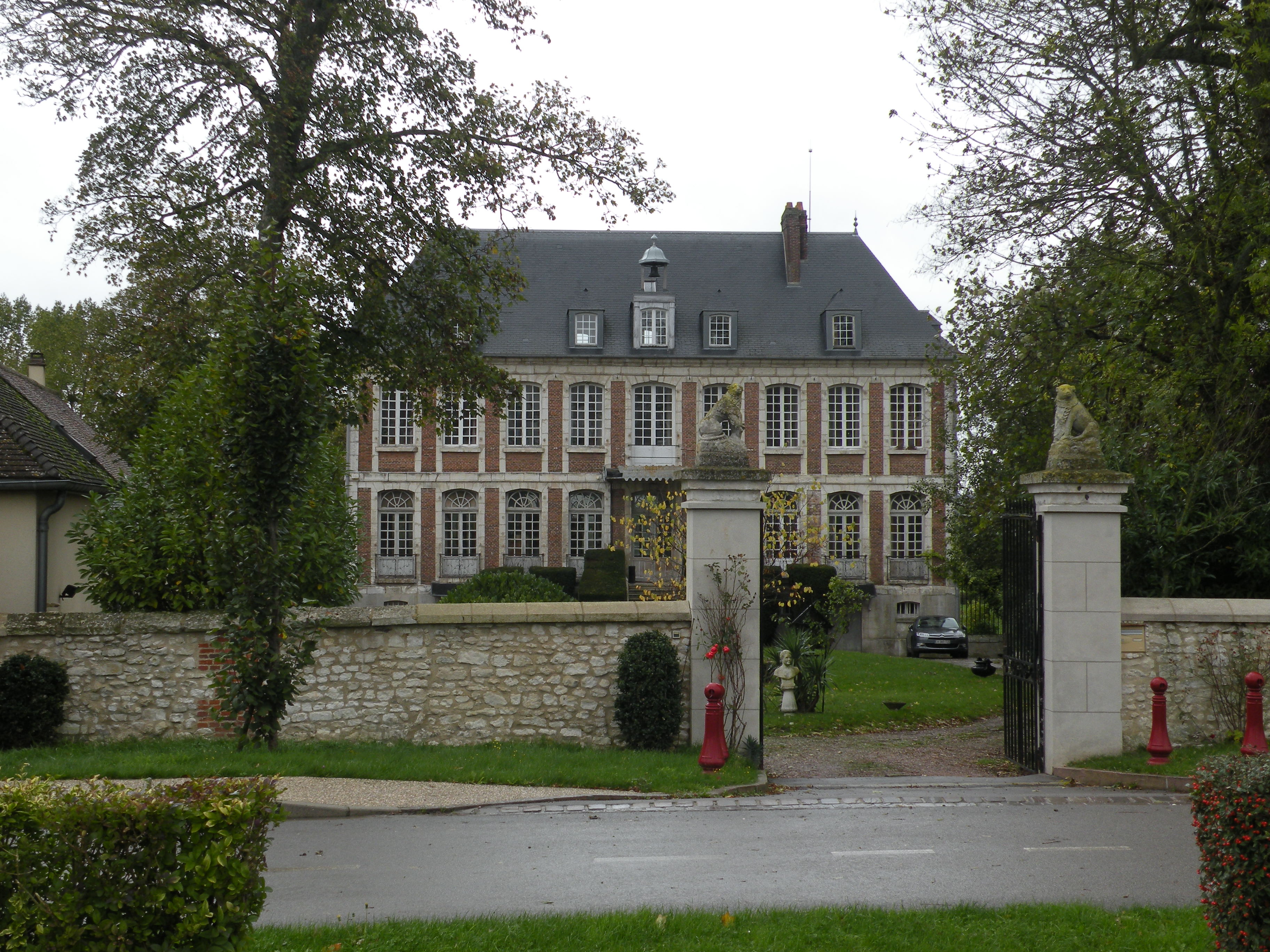 Saint-Martin-le-Nœud château